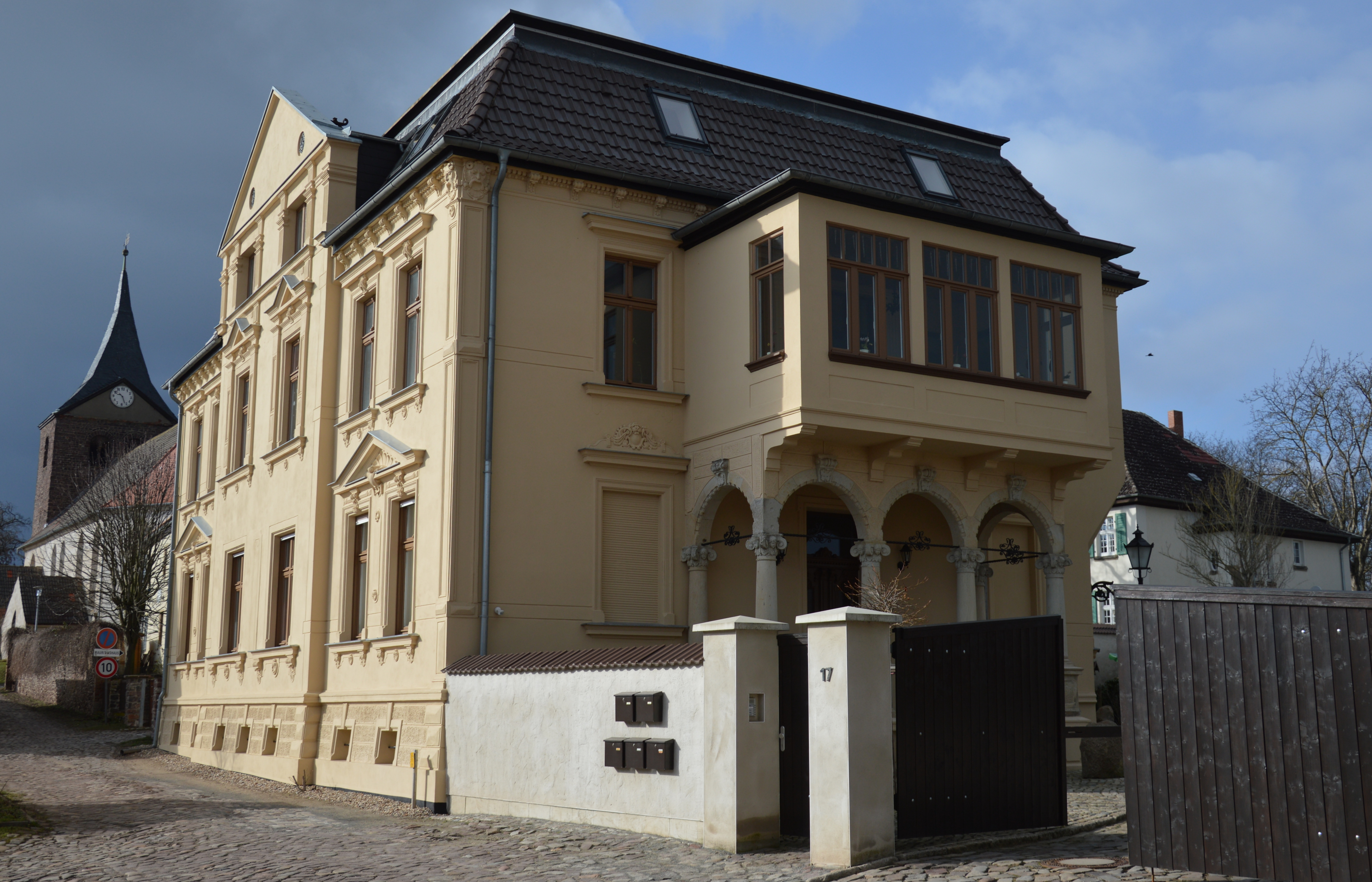 Haus Walter-Rathenau-Straße 17 in Niederndodeleben